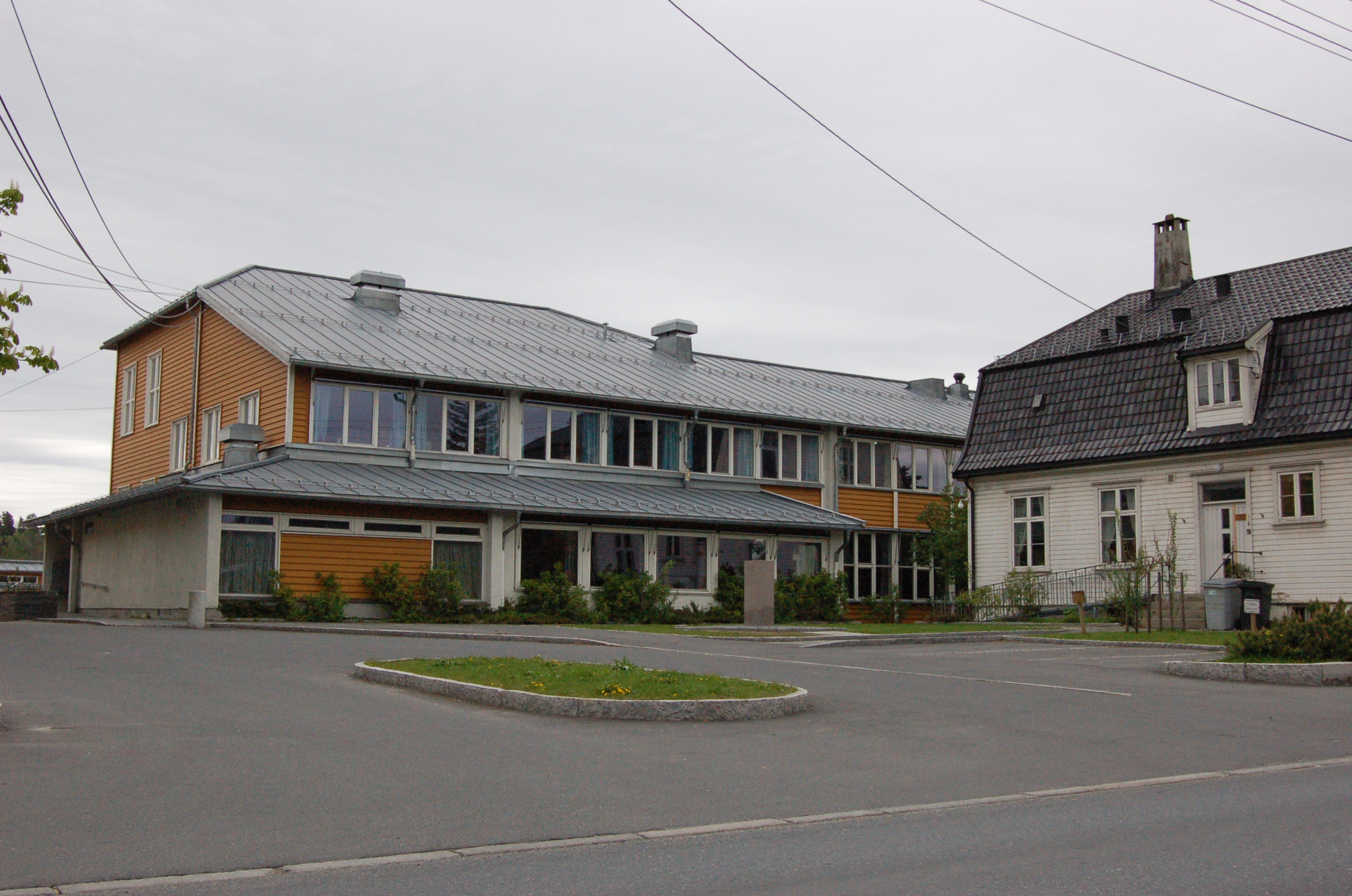 Abildsø skole i Oslo